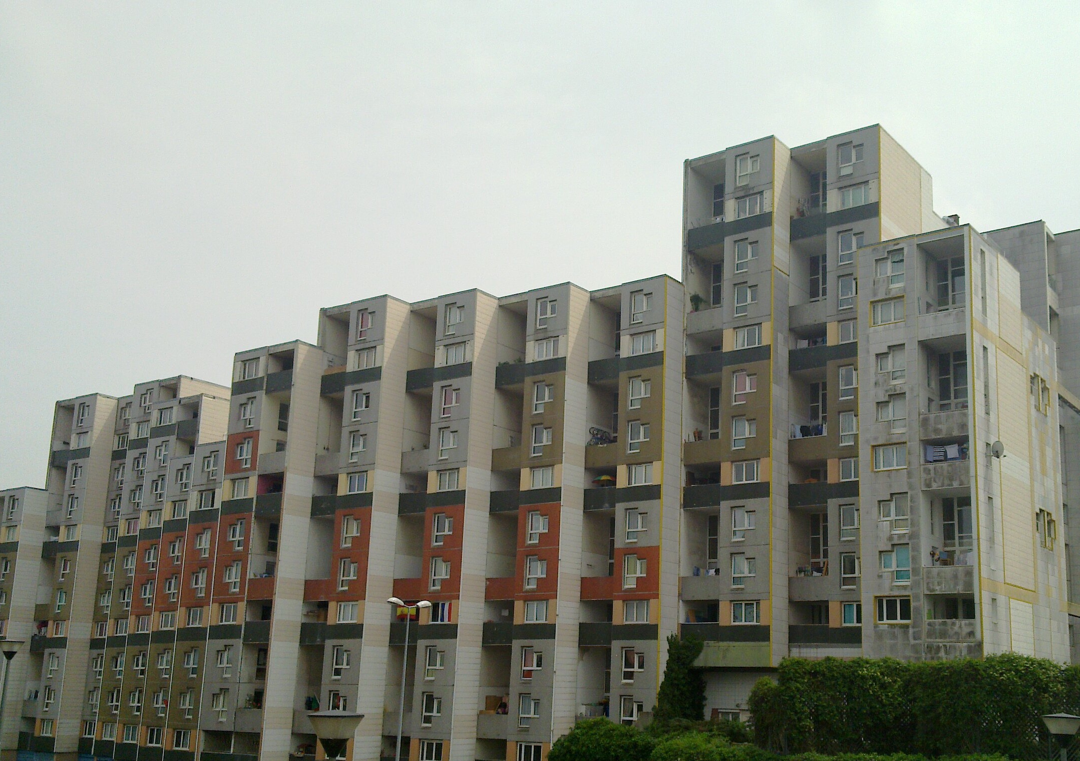 Immeubles du quartier du Pont de Bois, Villeneuve d'Ascq.